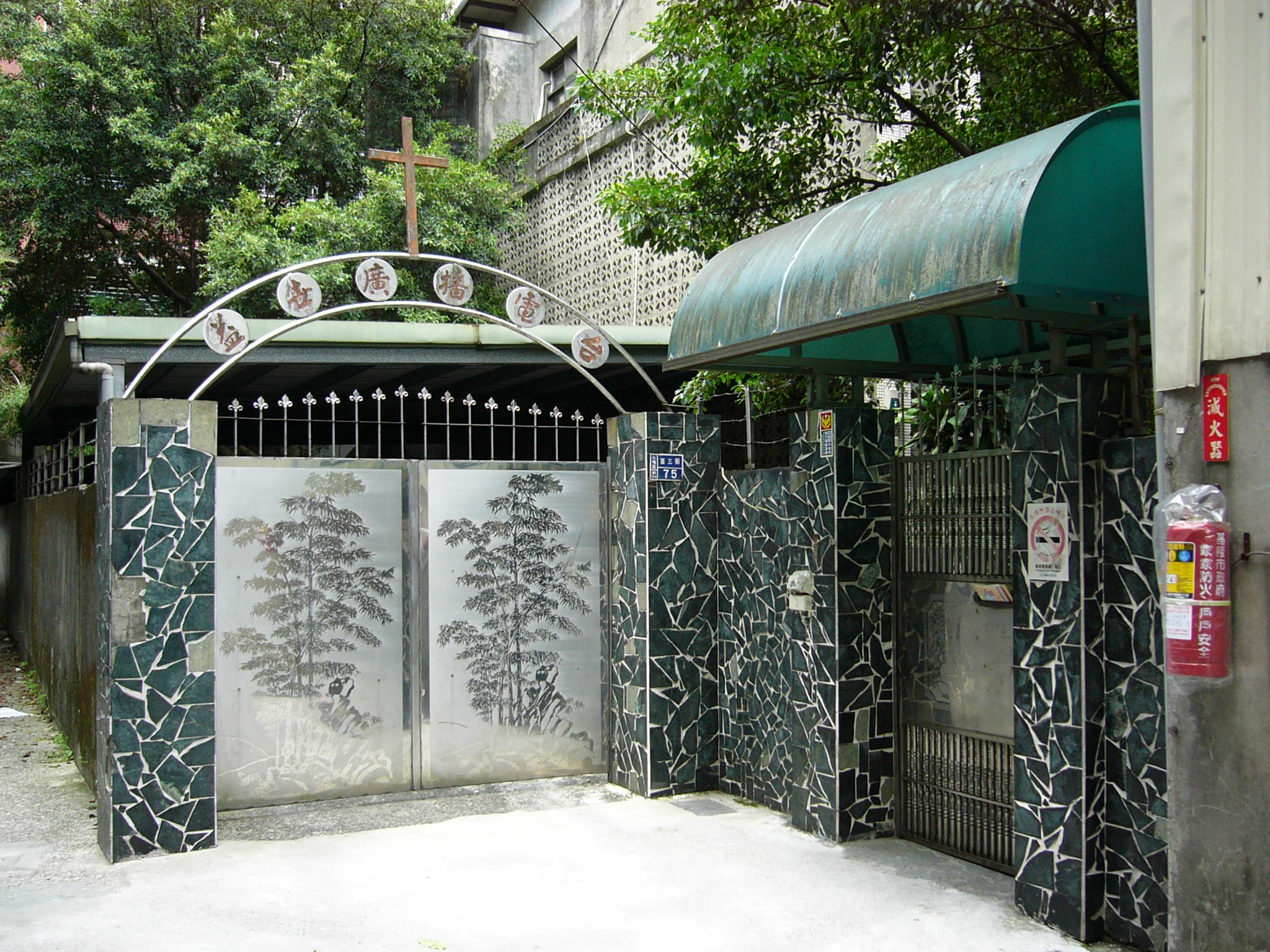 中文（台灣）: 財團法人天主教臺灣省基隆市益世堂益世廣播電台，位於基隆市七堵區百三街75號。